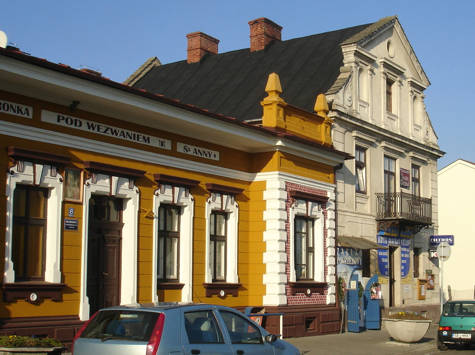 Wilamowice zabudowa, grudzień 2006